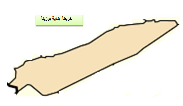 خريطة بوزينة